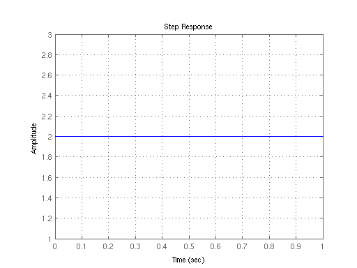 Step Response Diagram (P, K = 2)